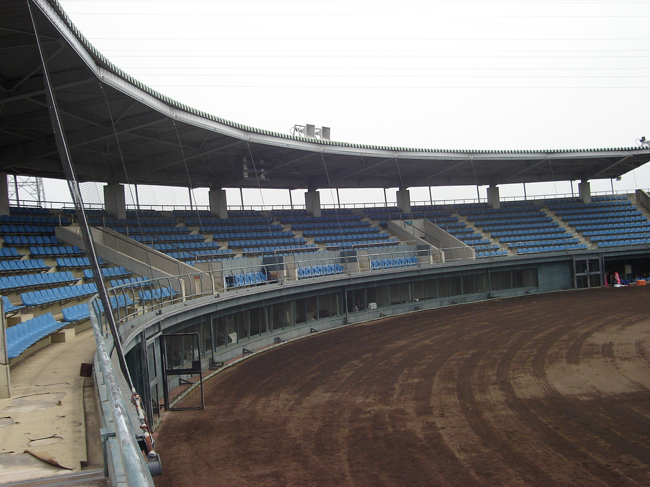 西条市東予運動公園野球場。 - 日本国愛媛県西条市にある野球場。